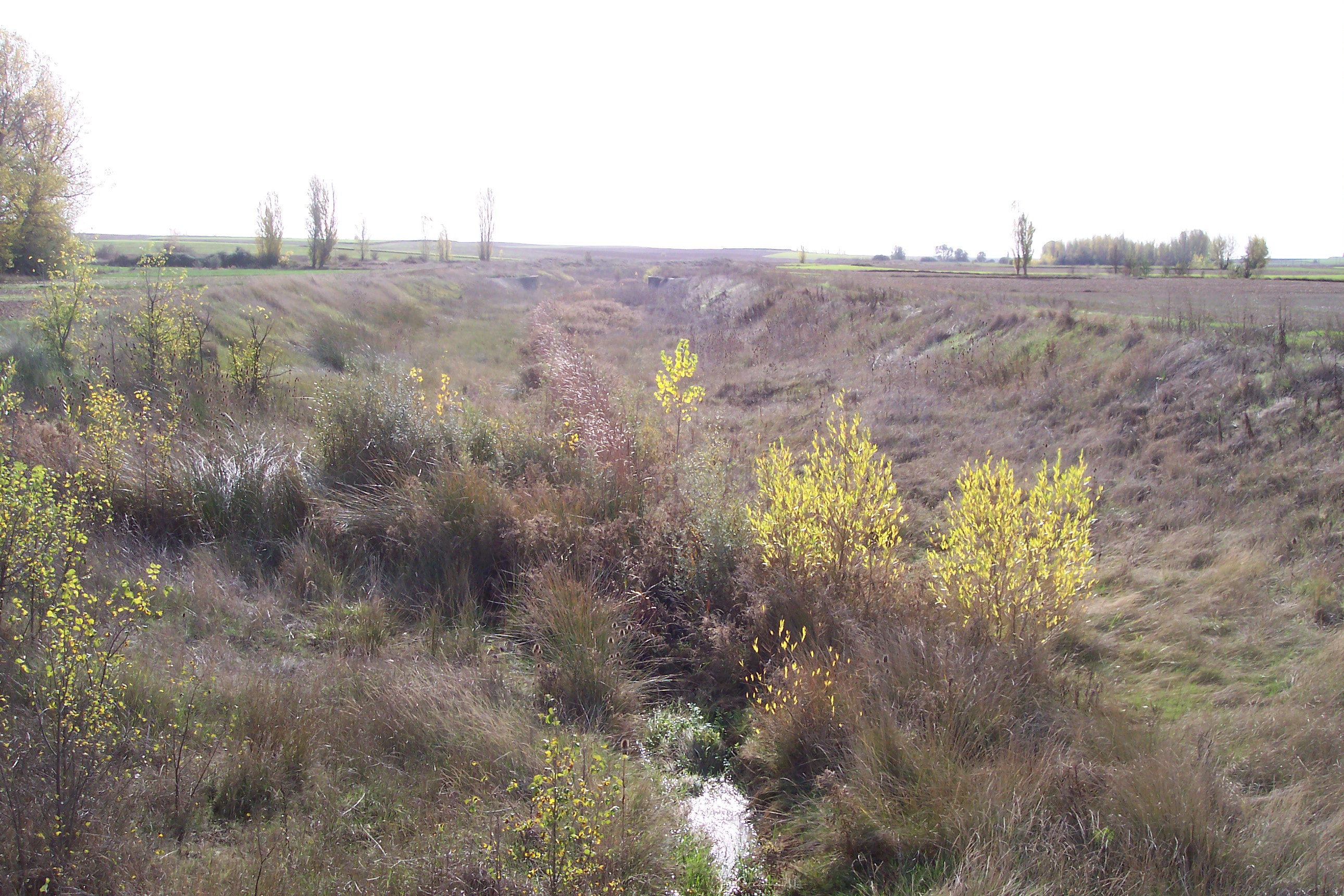 Vista del cauce del río Valdeginate a su paso por San Román de la Cuba (Palencia, España).